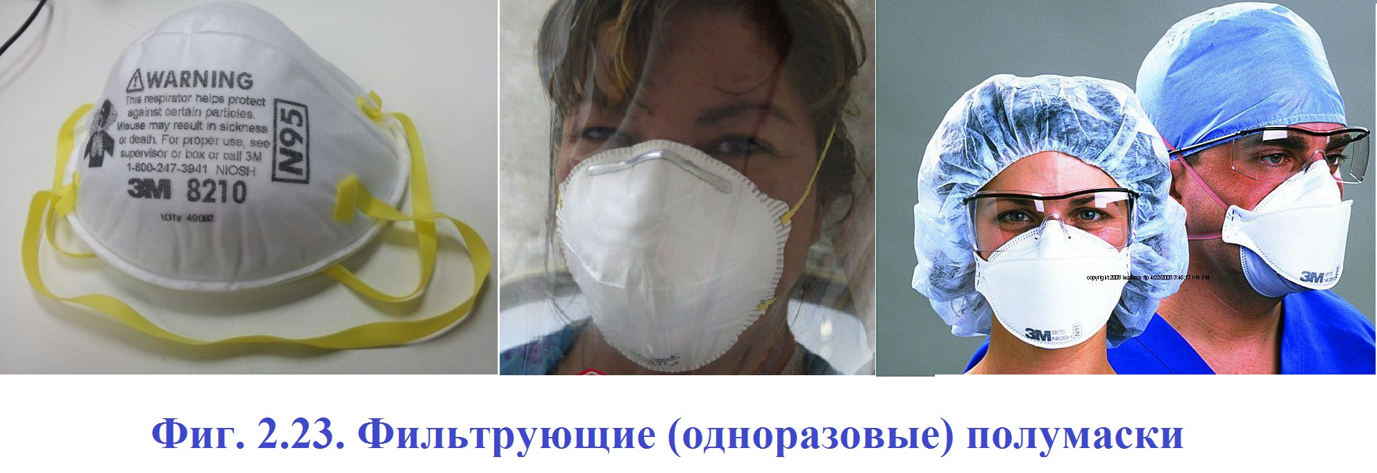 Фиг. 2-23. Фильтрующие (одноразовые) полумаски